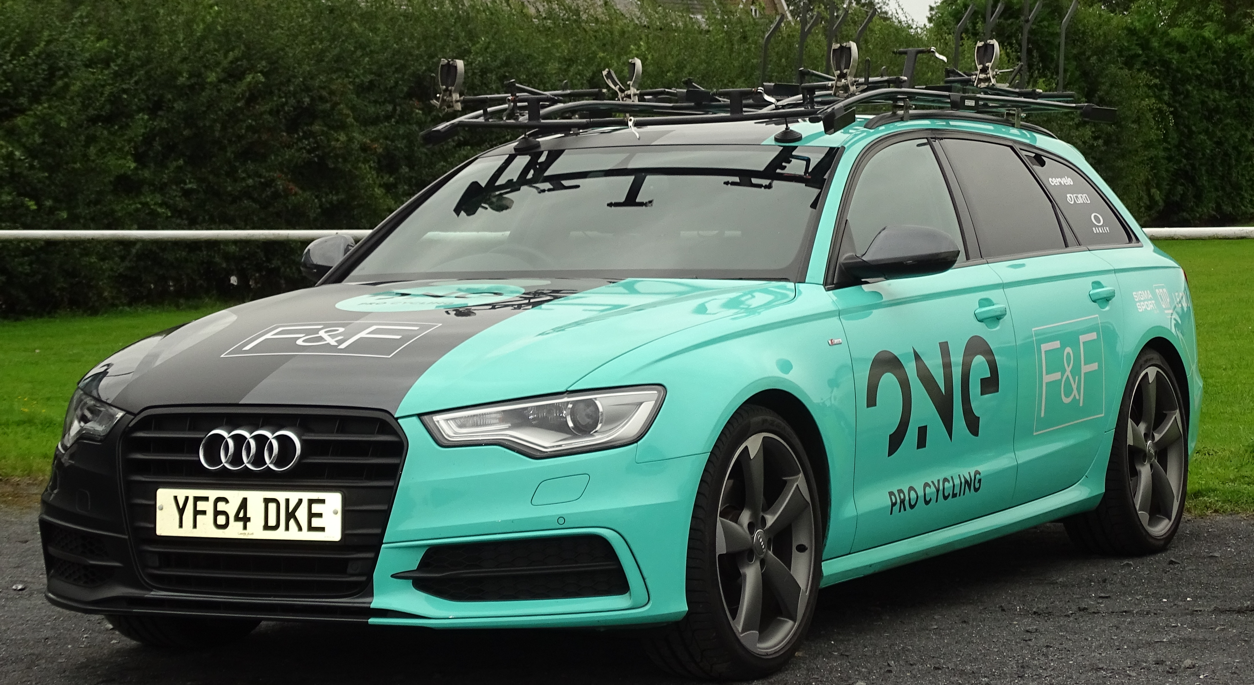 Reportage réalisé le mardi 25 août à l'occasion du départ et de l'arrivée du Grand Prix des Marbriers 2015 à Bellignies, Nord-Pas-de-Calais, France.